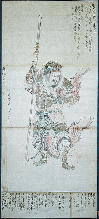 五十嵐浚明「画稿 張飛図」